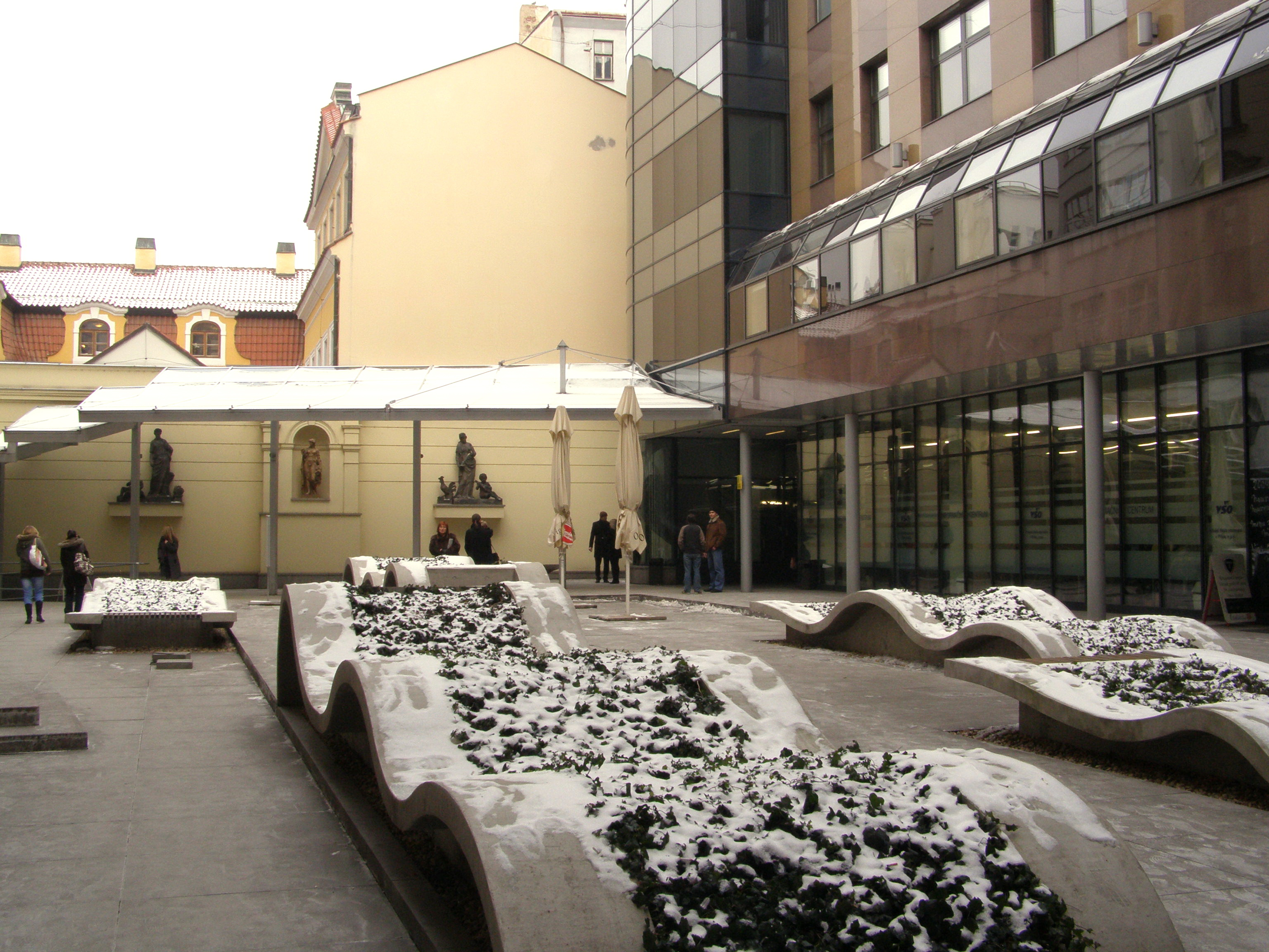 Praha, Vladislavova, dvůr nad podzemními garážemi České spořitelny; před stavbou garáží zde byl proveden průzkum středověkého židovského hřbitova Židovská zahrada